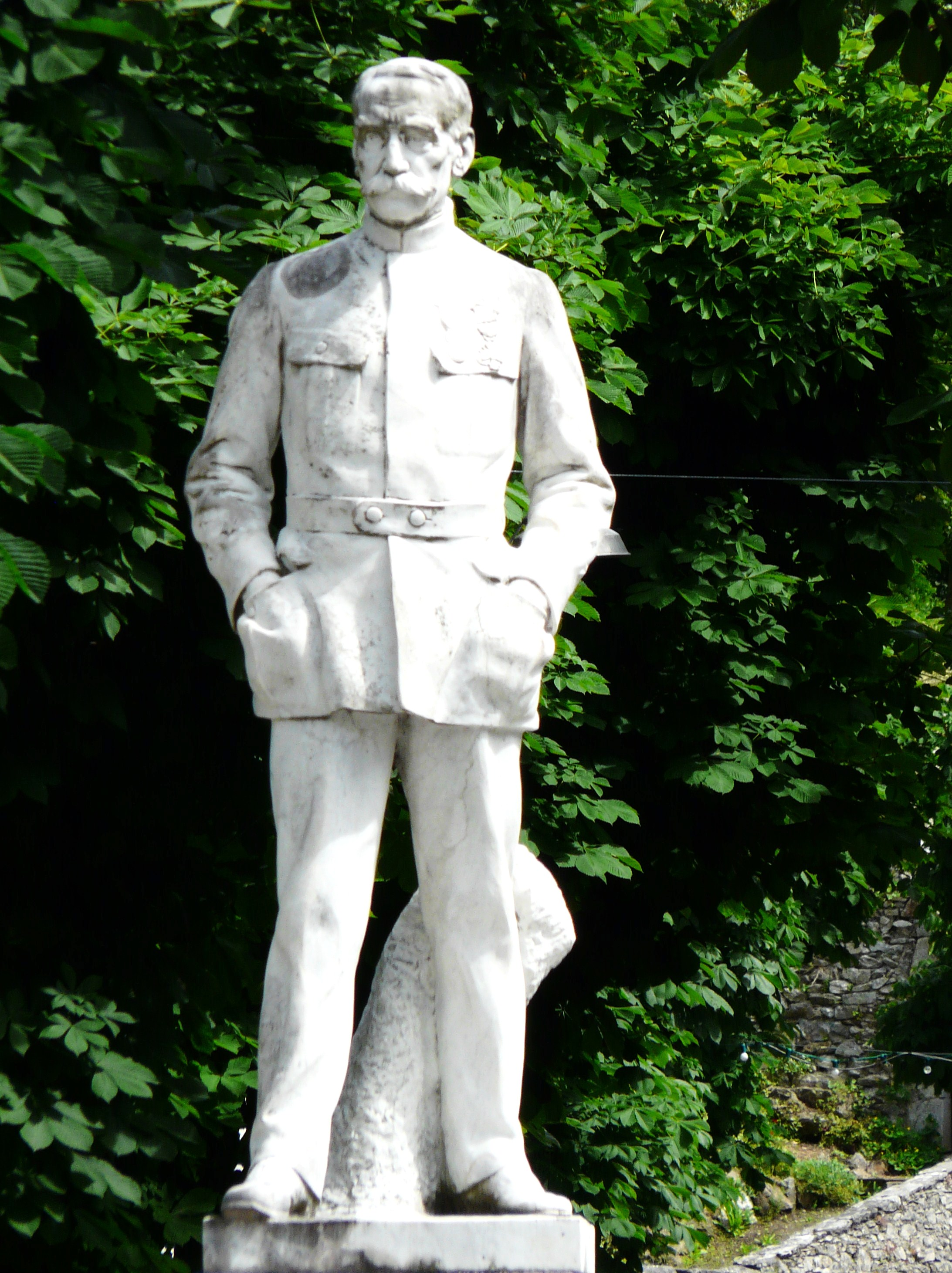 La statue du maréchal Gallieni à Saint-Béat (son village natal), Haute-Garonne, France.